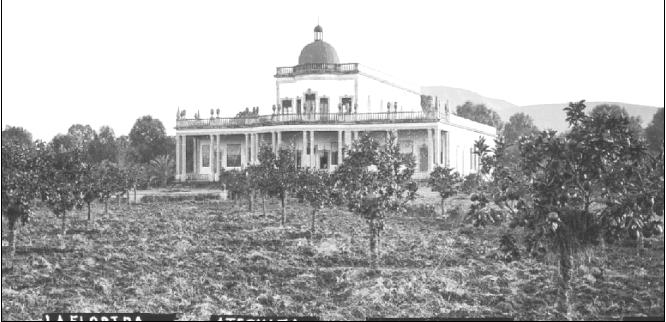 "Aloha" or "La Florida" country house on Atequiza, Mexico